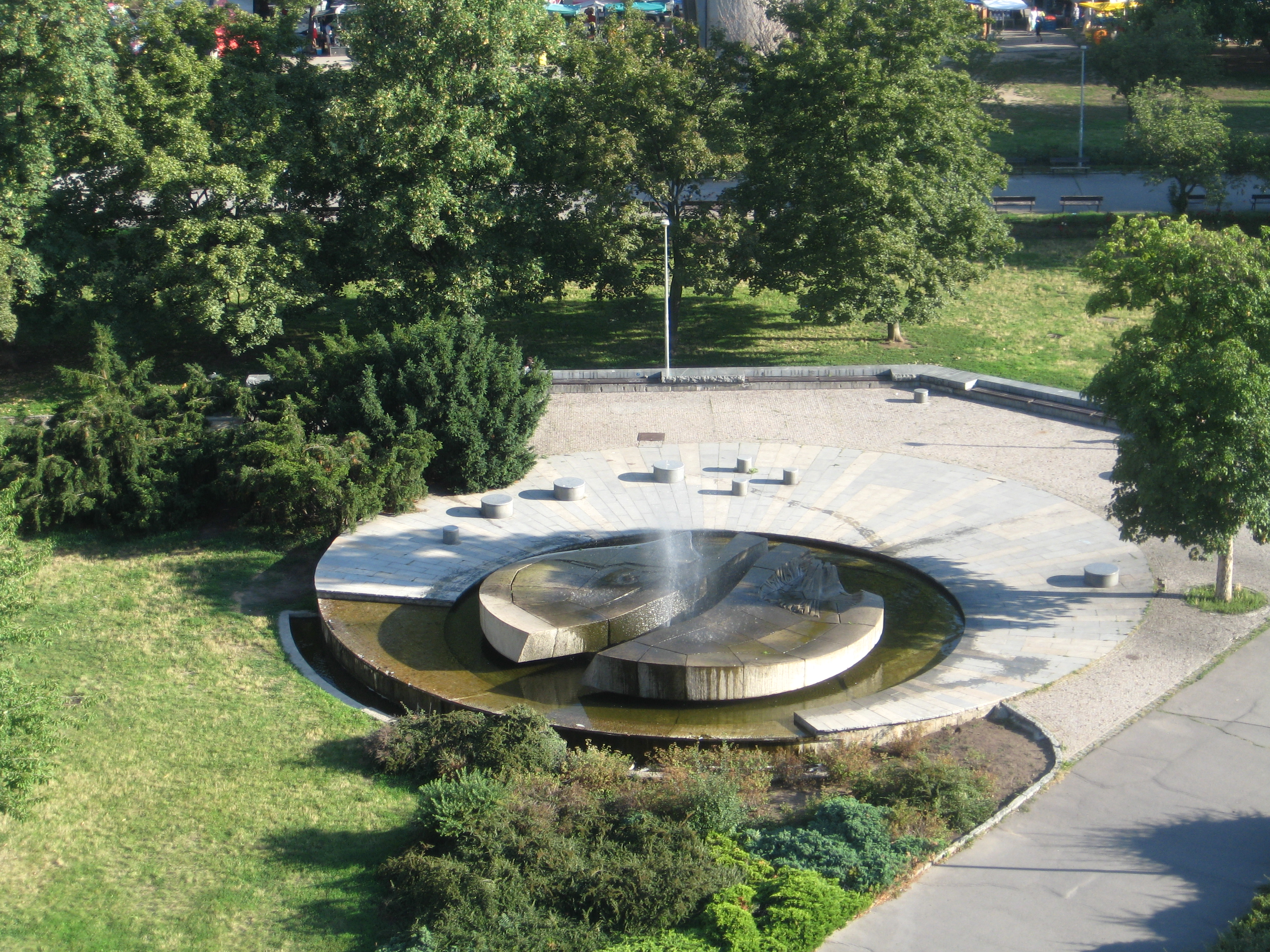 Fontána u metra (vzniklá 1980, po drobné revitalizaci v červenci 2019).